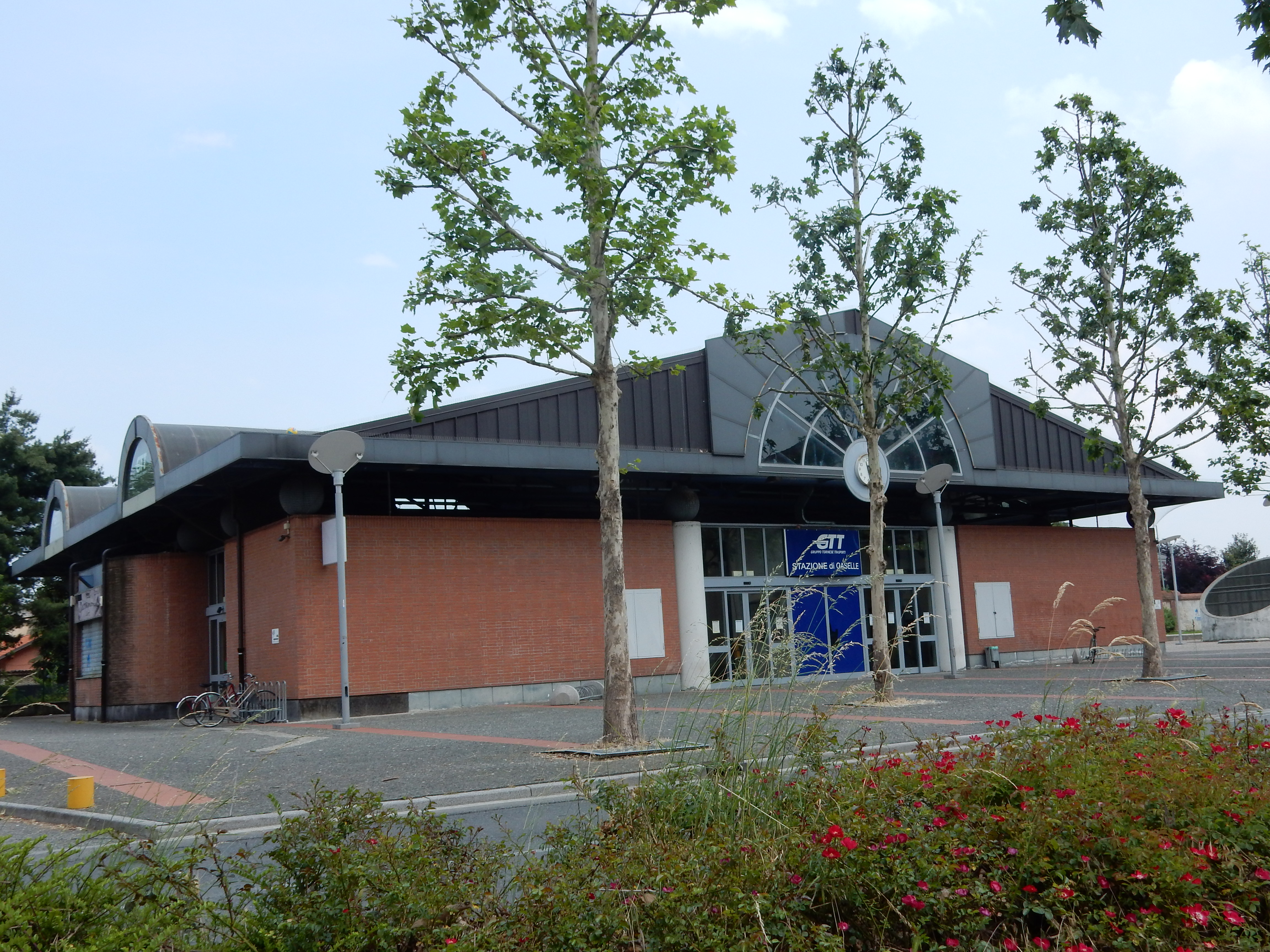 Esterno nuova Stazione Caselle